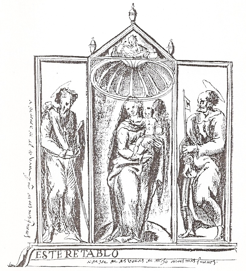 Dibujo del pintor Julián Maldonado para el retablo de Frades (despoblado de la Tierra de Cuéllar -Segovia-)